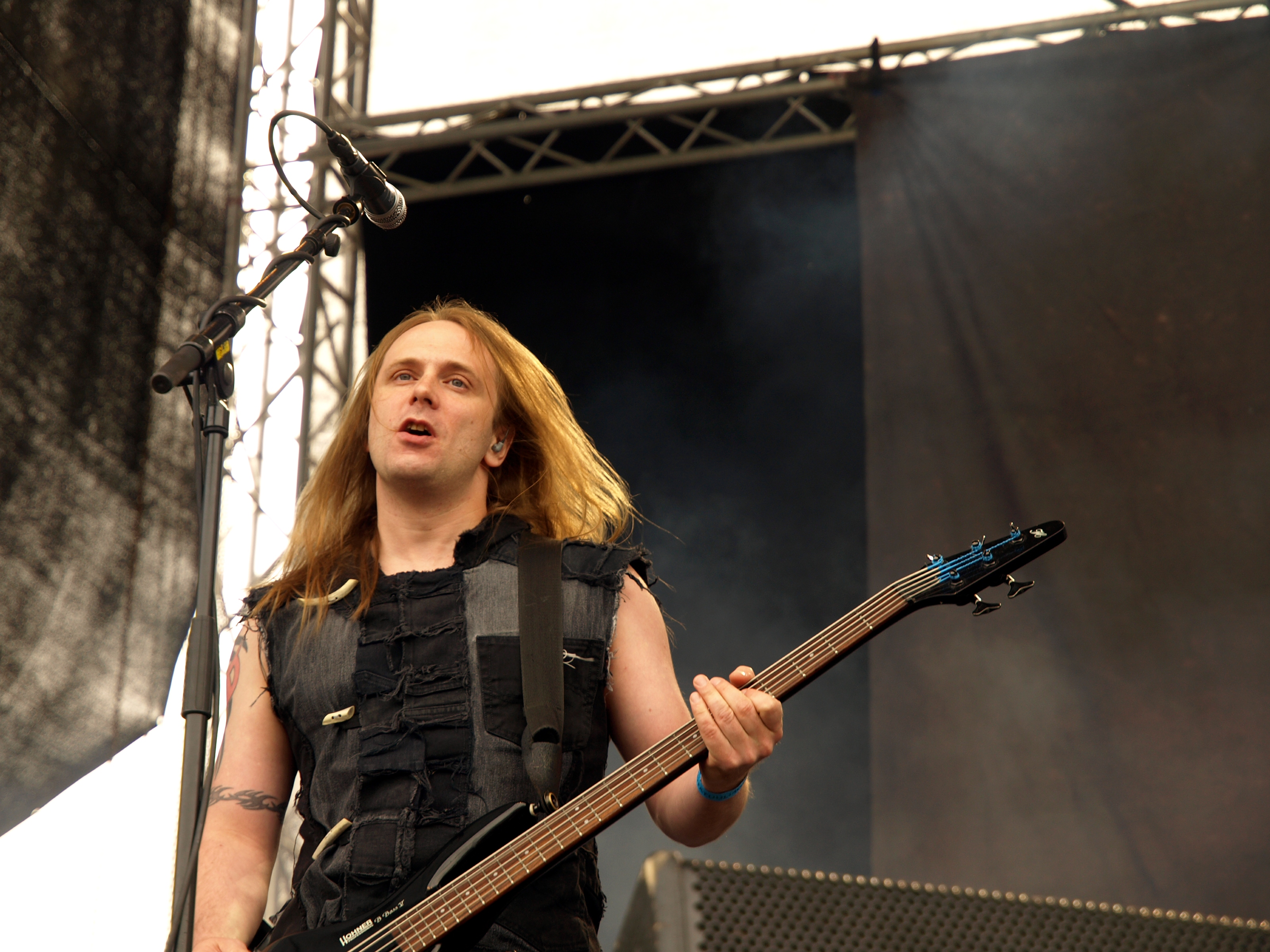 Metsatöll live am Myötätuulirock 2011